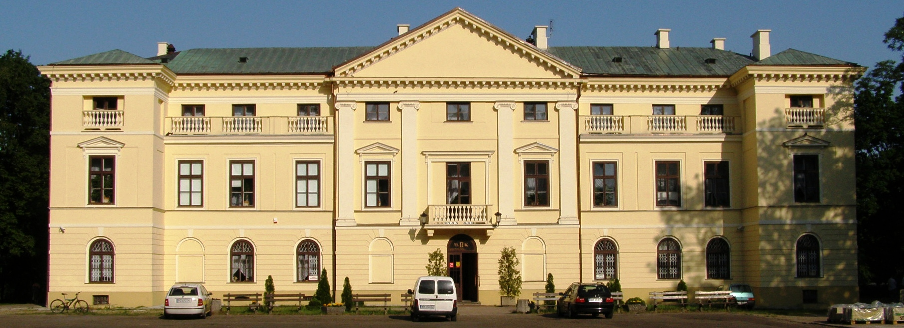 Pałac Dernałowiczów w Mińsku Mazowieckim